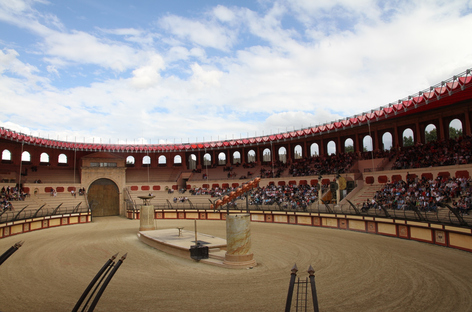 Le Signe du Triomphe